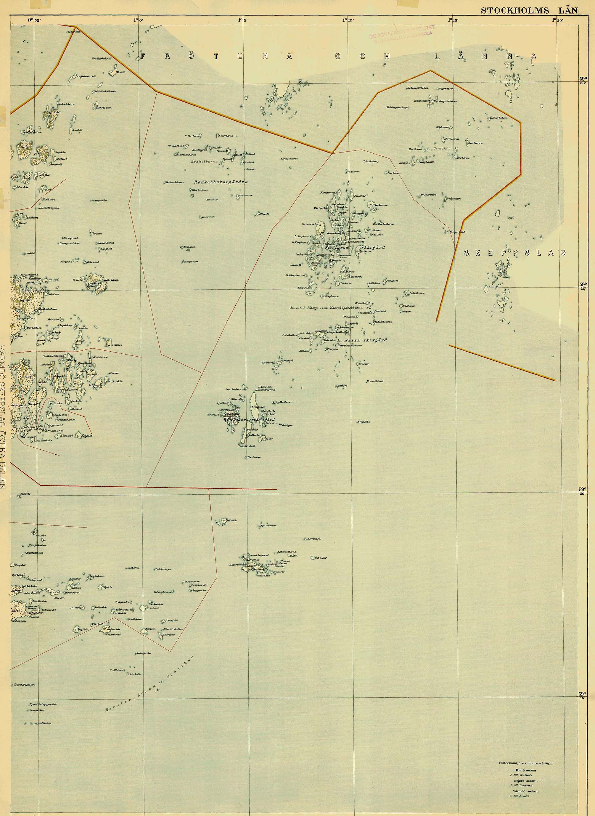 Karta över den yttre delen av skeppslagen år 1860.